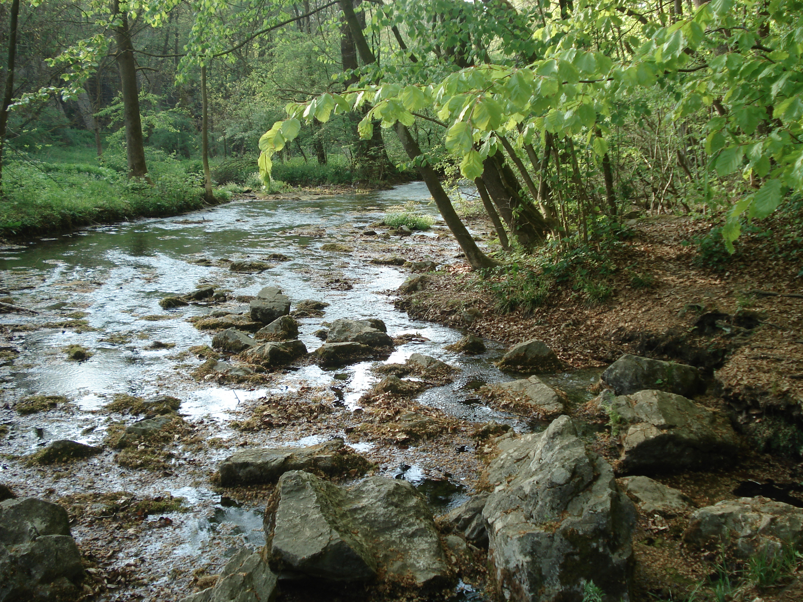 Die ersten Quellen, die den Almefluss bilden